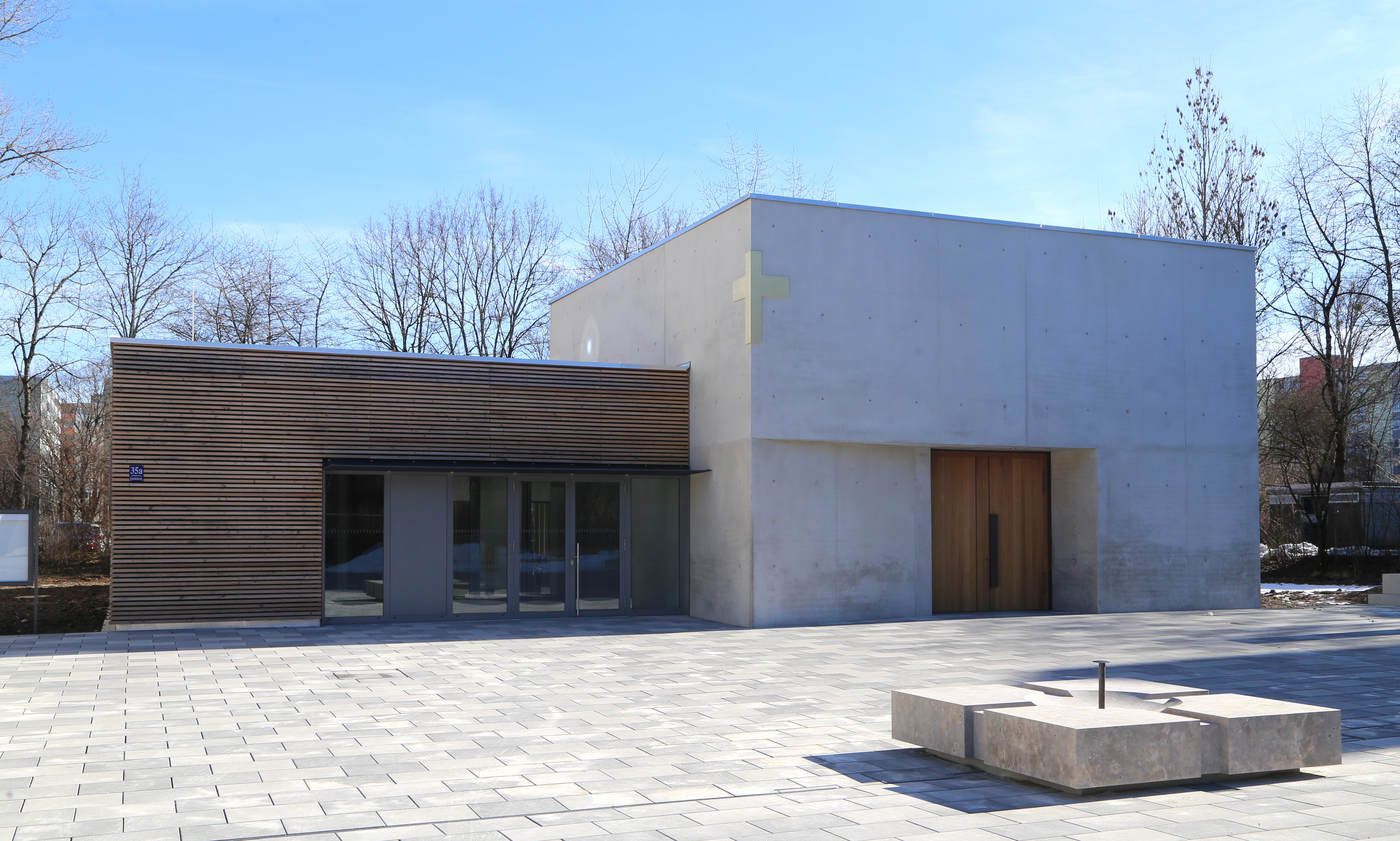 St. Jakobus, Quiddestraße 35a, Neuperlach, München. 2019 fertiggestellt